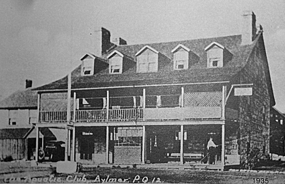 Hôtel Symmes en 1935 à Aylmer. Hébergeant le Aquatic Club reproduction d'une photographie de 1935, par: P.Q.12 (aucune autre information connue)